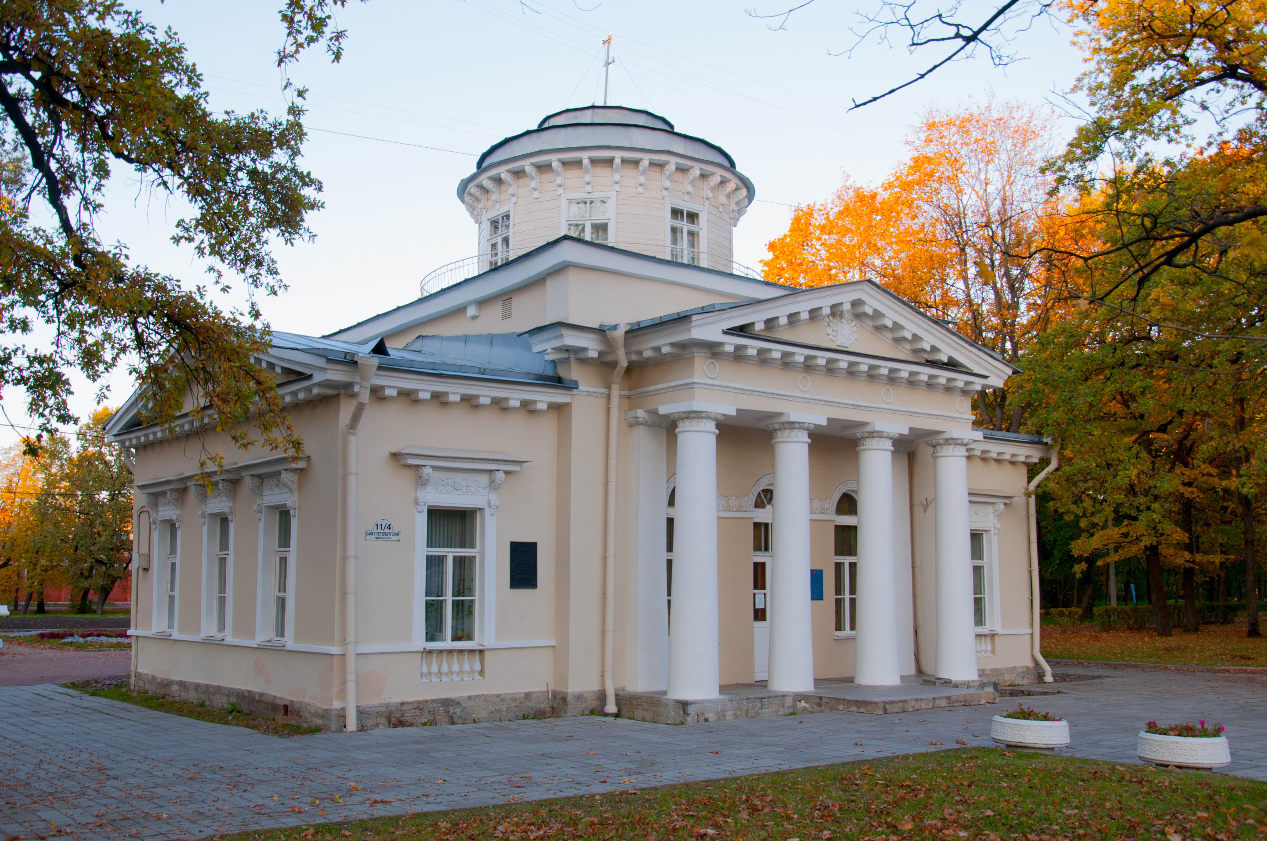 Дом Струкова П. А. с садом (Санкт-Петербург и Лен.область, Петергоф, Санкт-Петербургский проспект, 11)